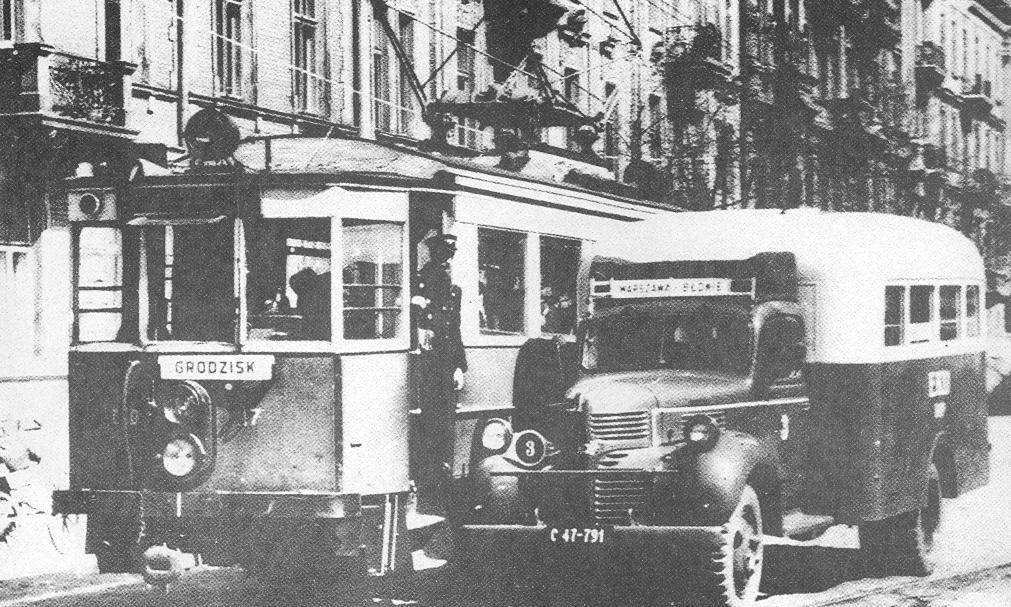 Elektryczny wagon silnikowy EKD 17 i autobus EKD nr 3 na ulicach powojennej Warszawy.